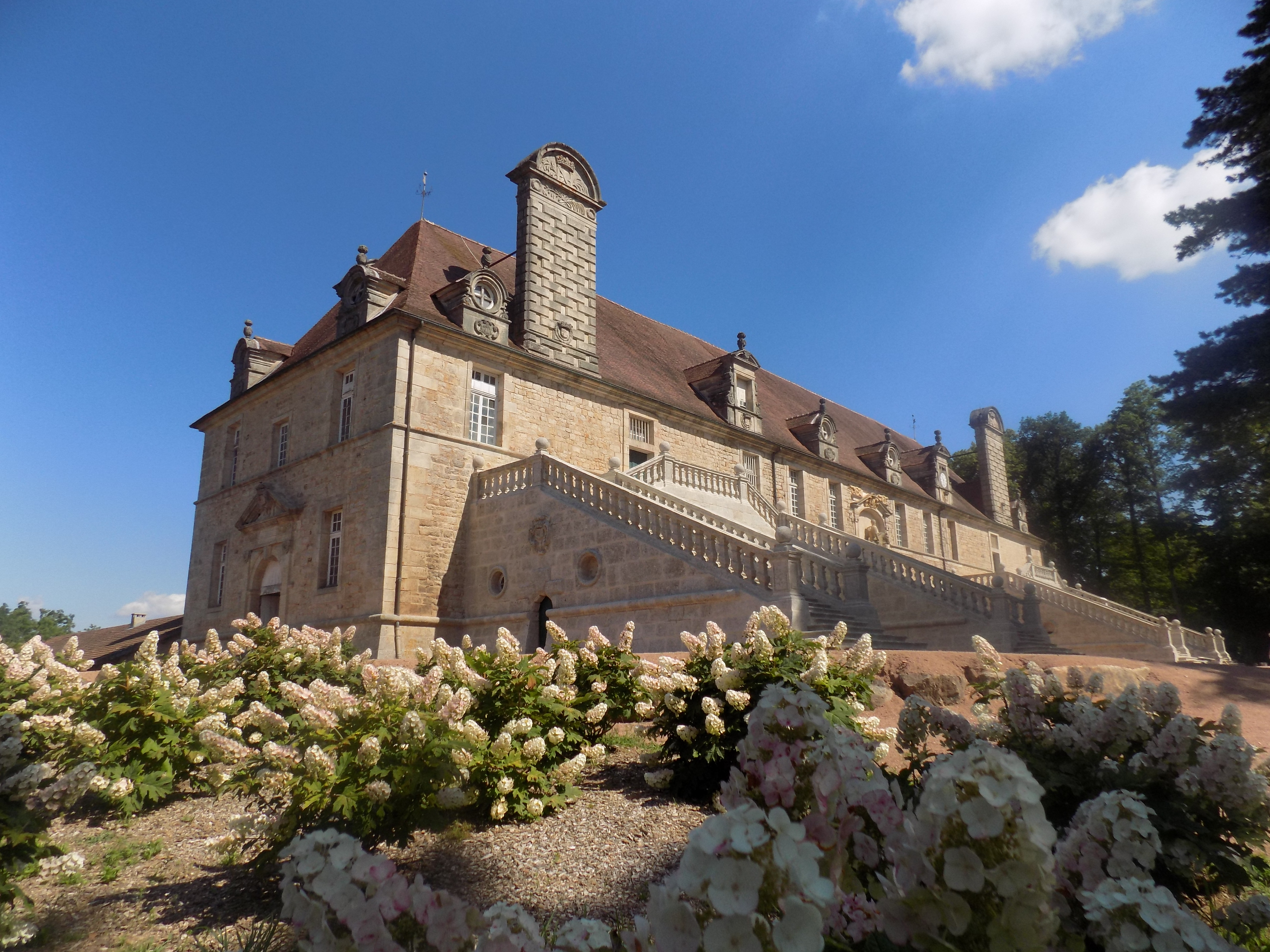 Ecuries de Chaumont-Laguiche - Copyright Xavier Flambard